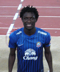 Fodé Bangaly Diakité